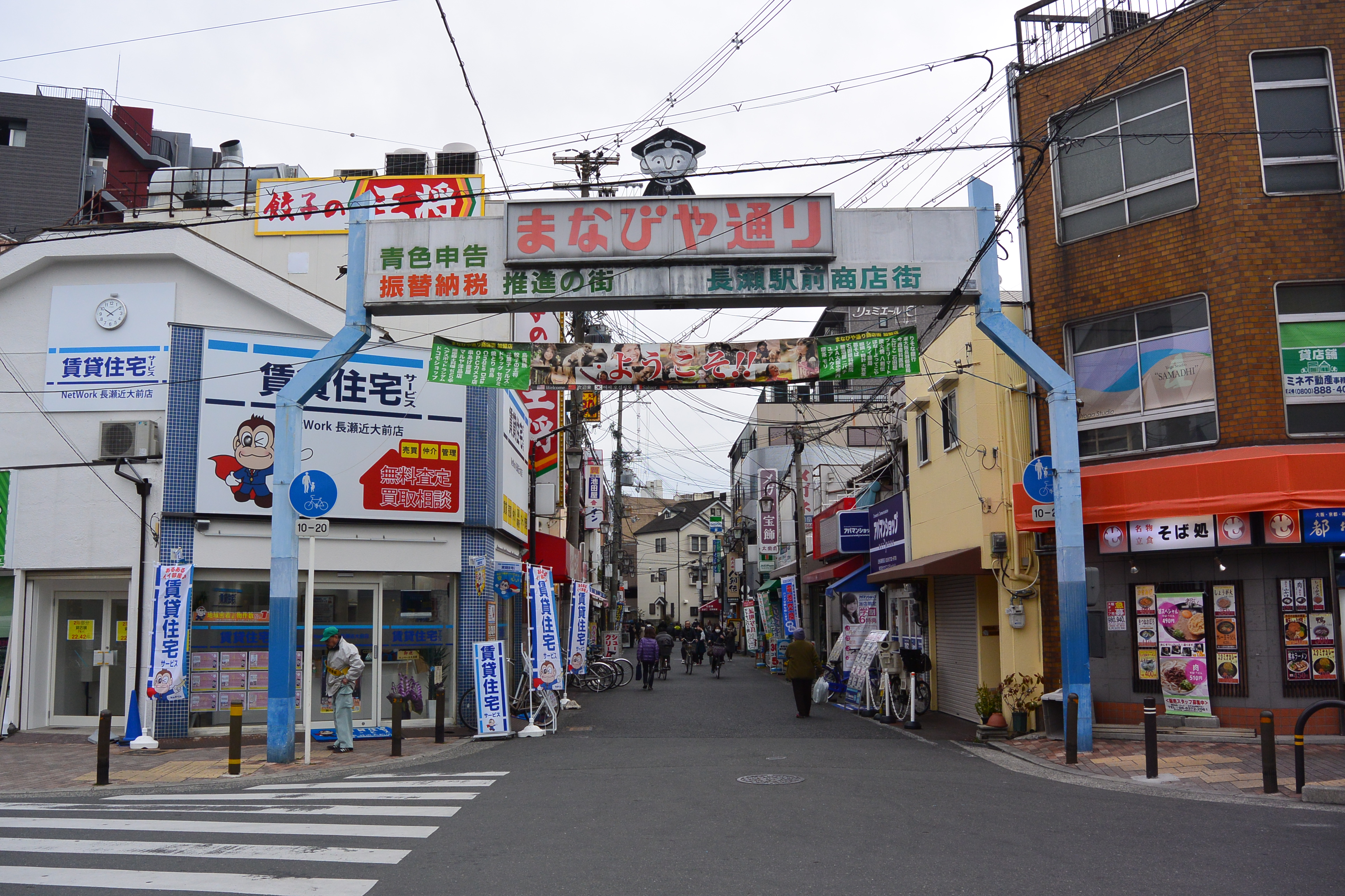 近鉄大阪線の長瀬駅前商店街、近畿大学への通学路に当たる Nikon 1 AW1 + 1 Nikkor AW 11-27.5mm f/3.5-5.6